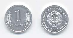 1 копейка ПМР 2000 года